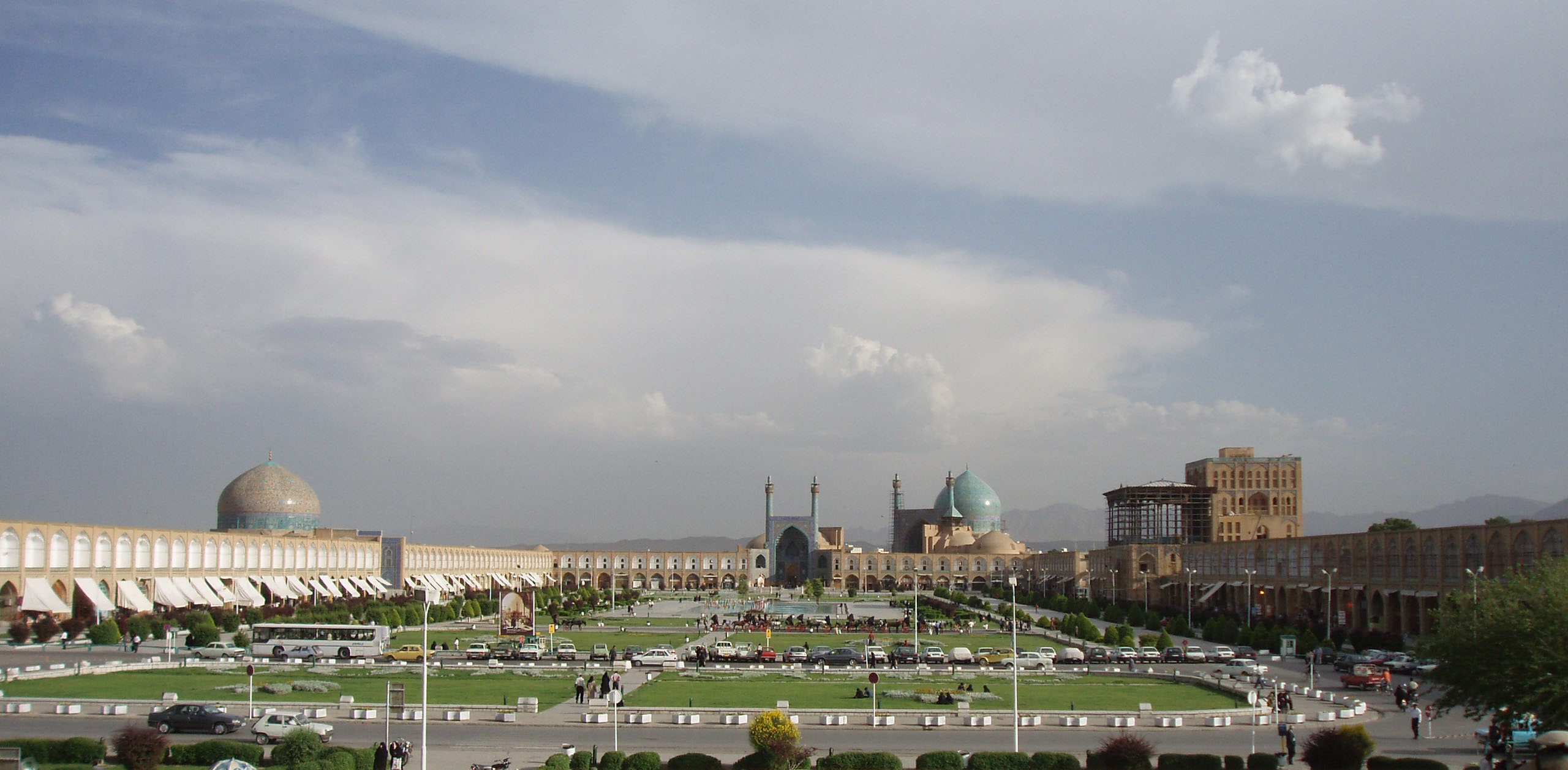 Imam Square